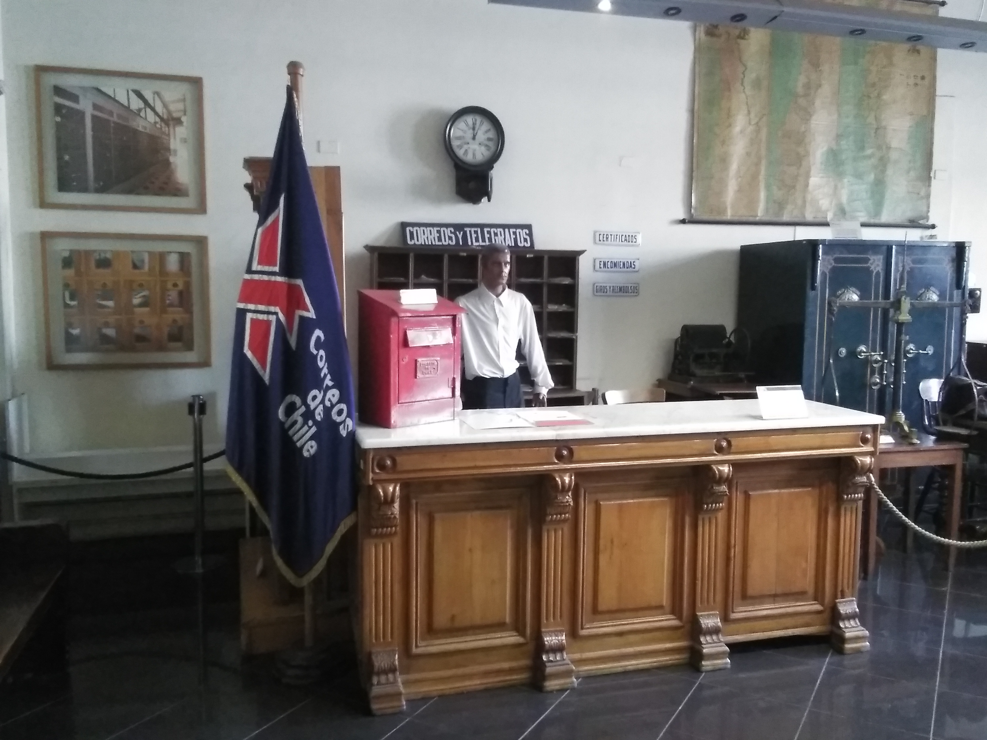 Representación de una antigua oficina de Correos, en el Museo Postal y Telegráfico (Santiago de Chile)